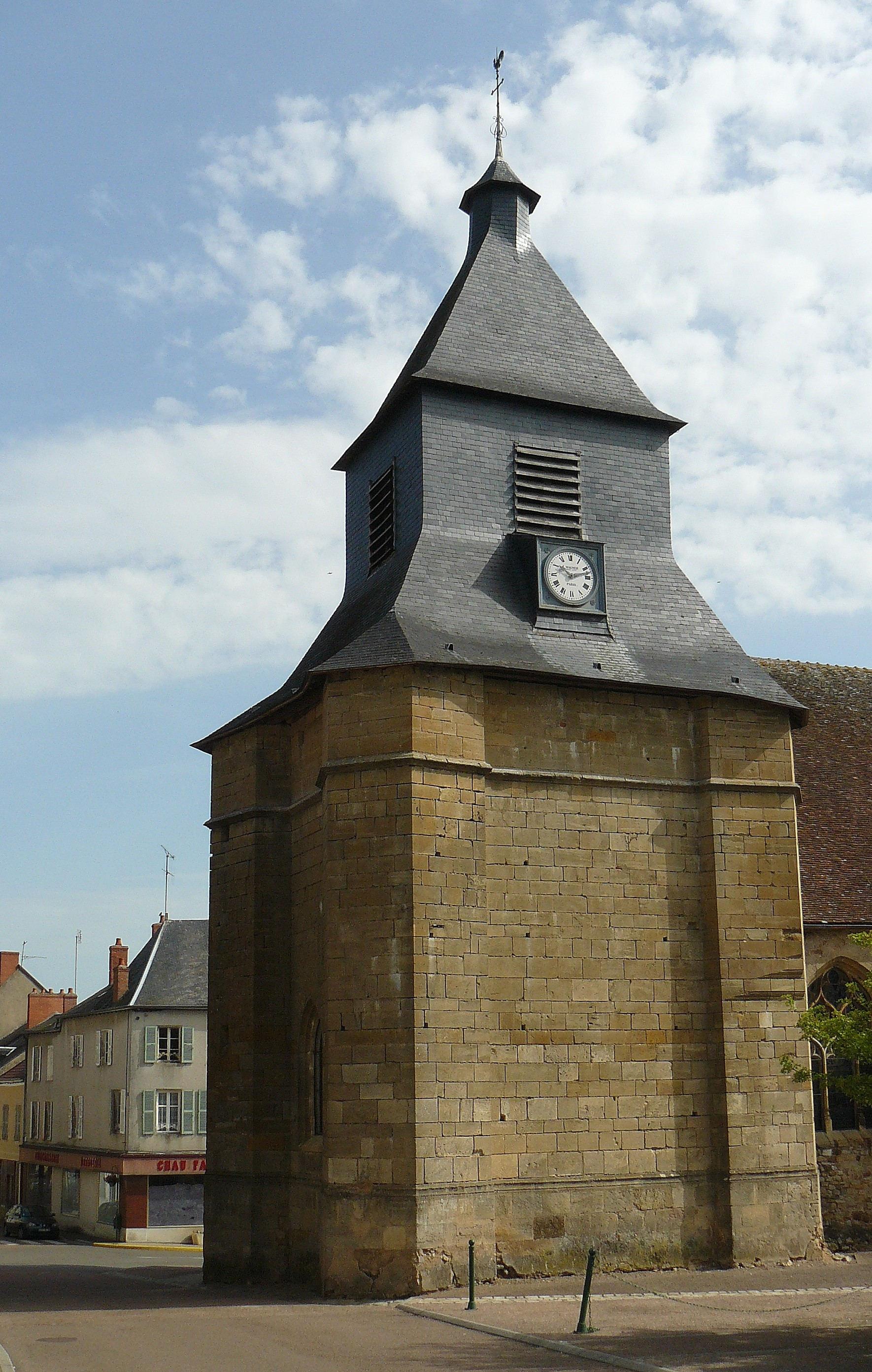 Clocher de l'église de Saint-Saulge (Nièvre, France)